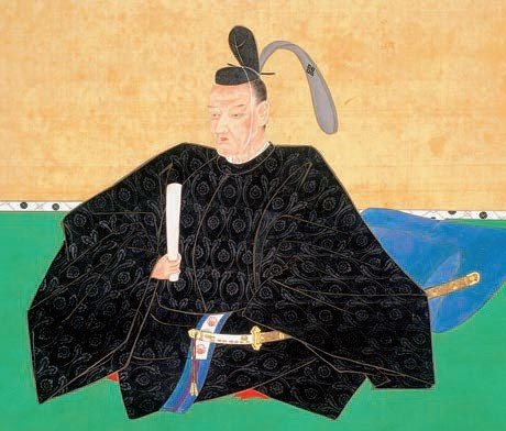 津軽寧親の肖像。